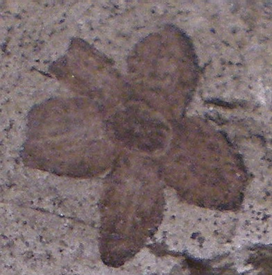 Royena graeca, fruit fossil